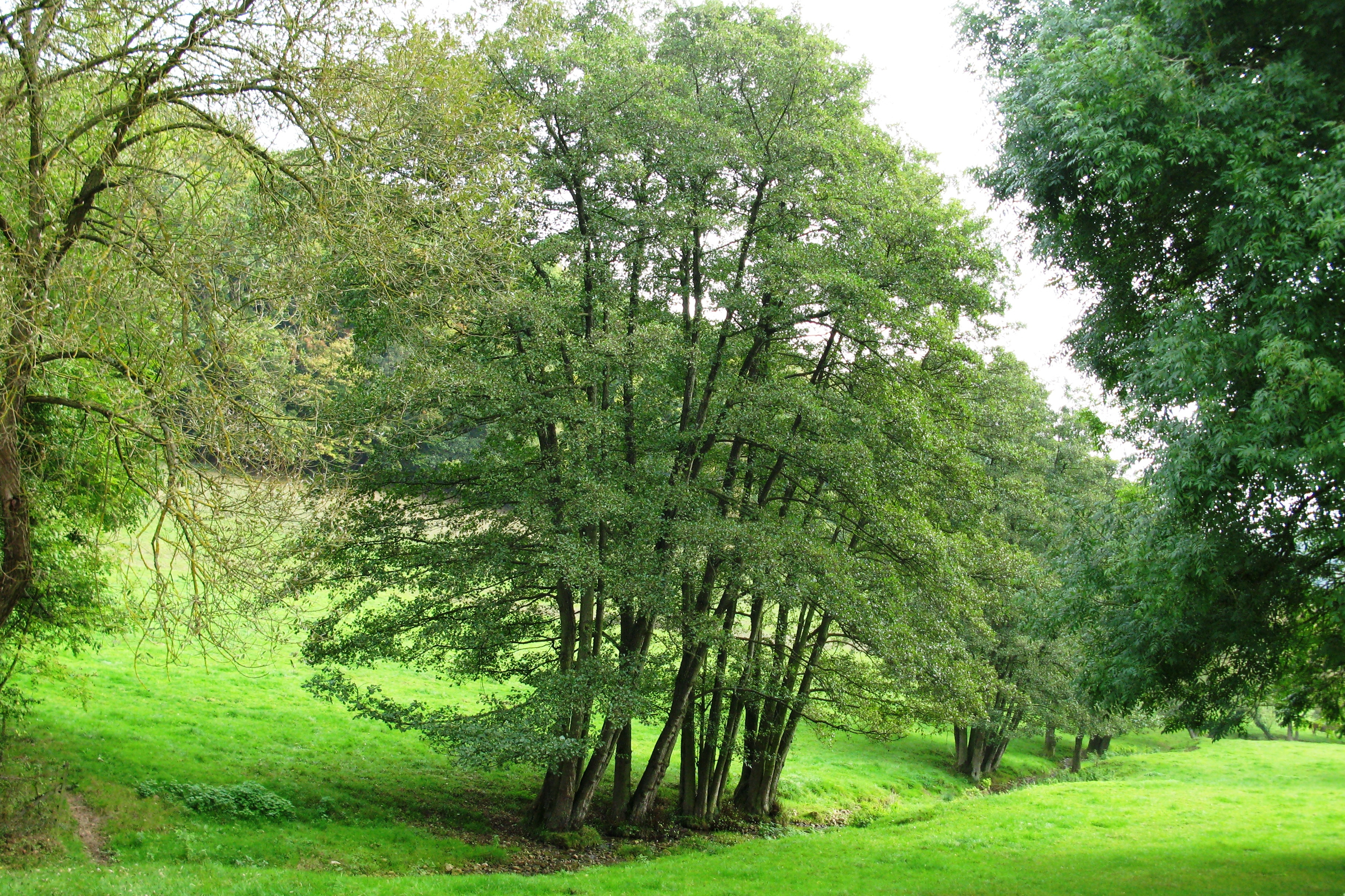 D'Rollengerbaach ongeféier op der Halschent vun hirem Laf.